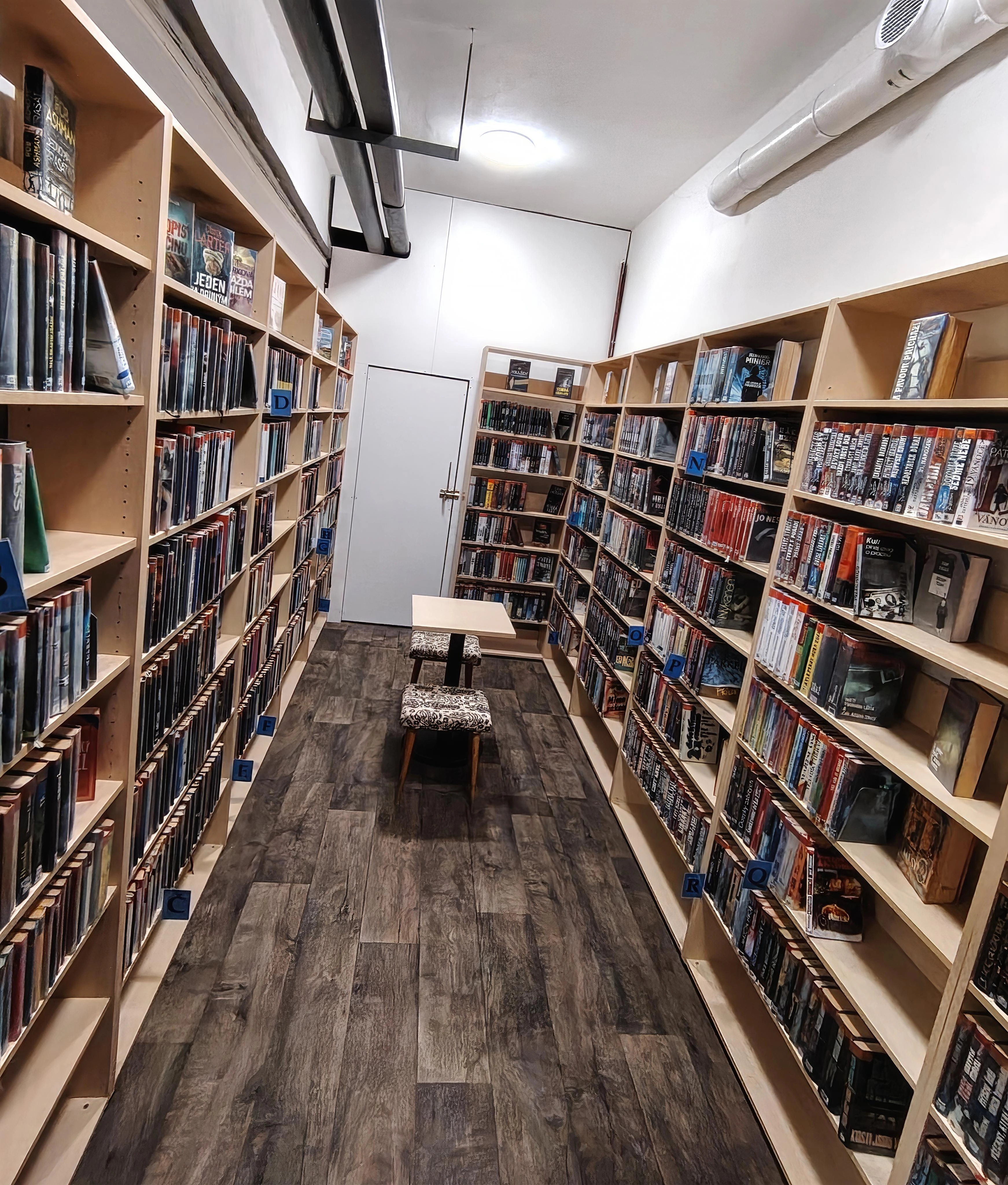 Knihovna Dubina interiér